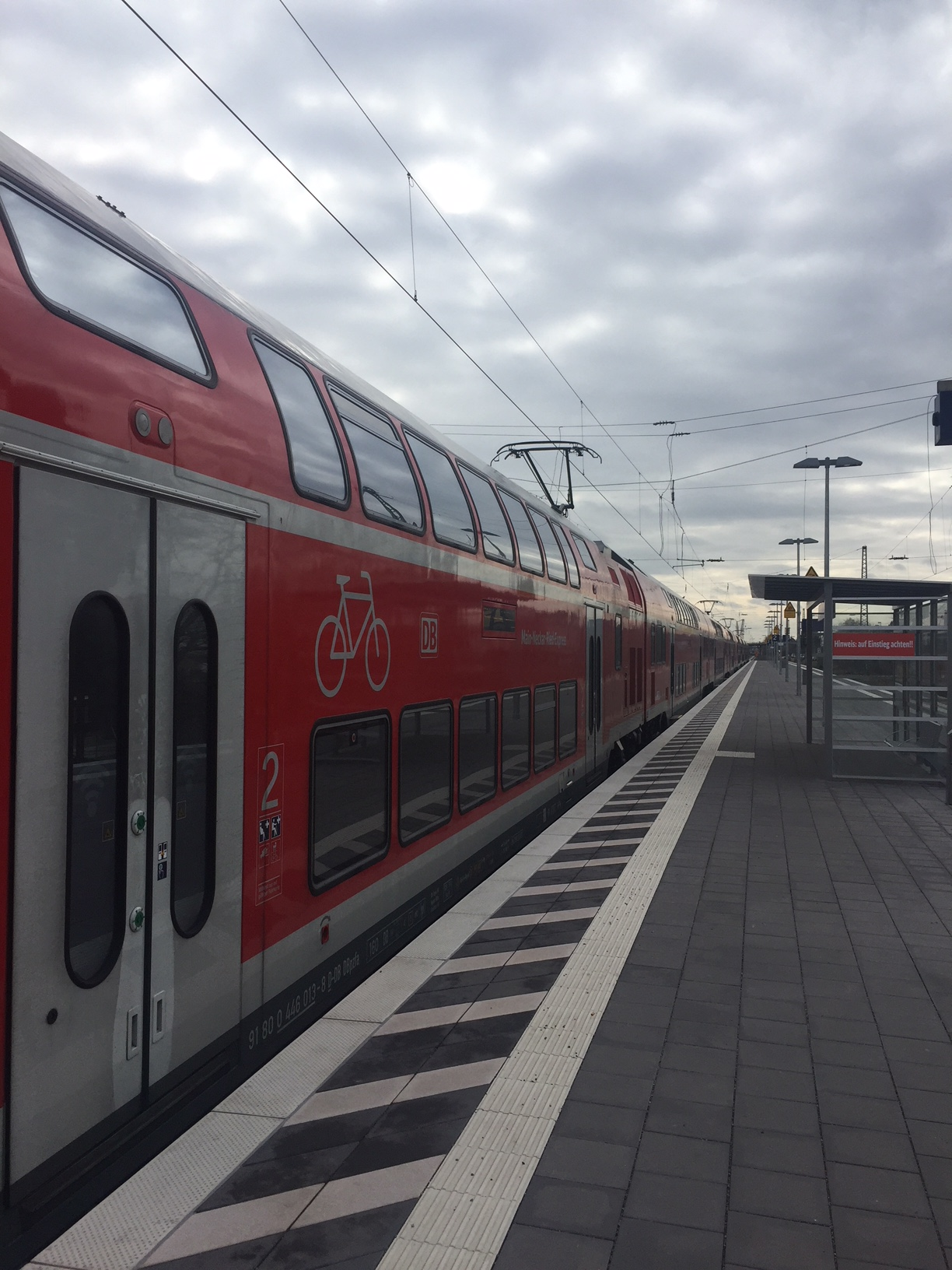 Bahnsteig 2 (Bensheim-Auerbach)